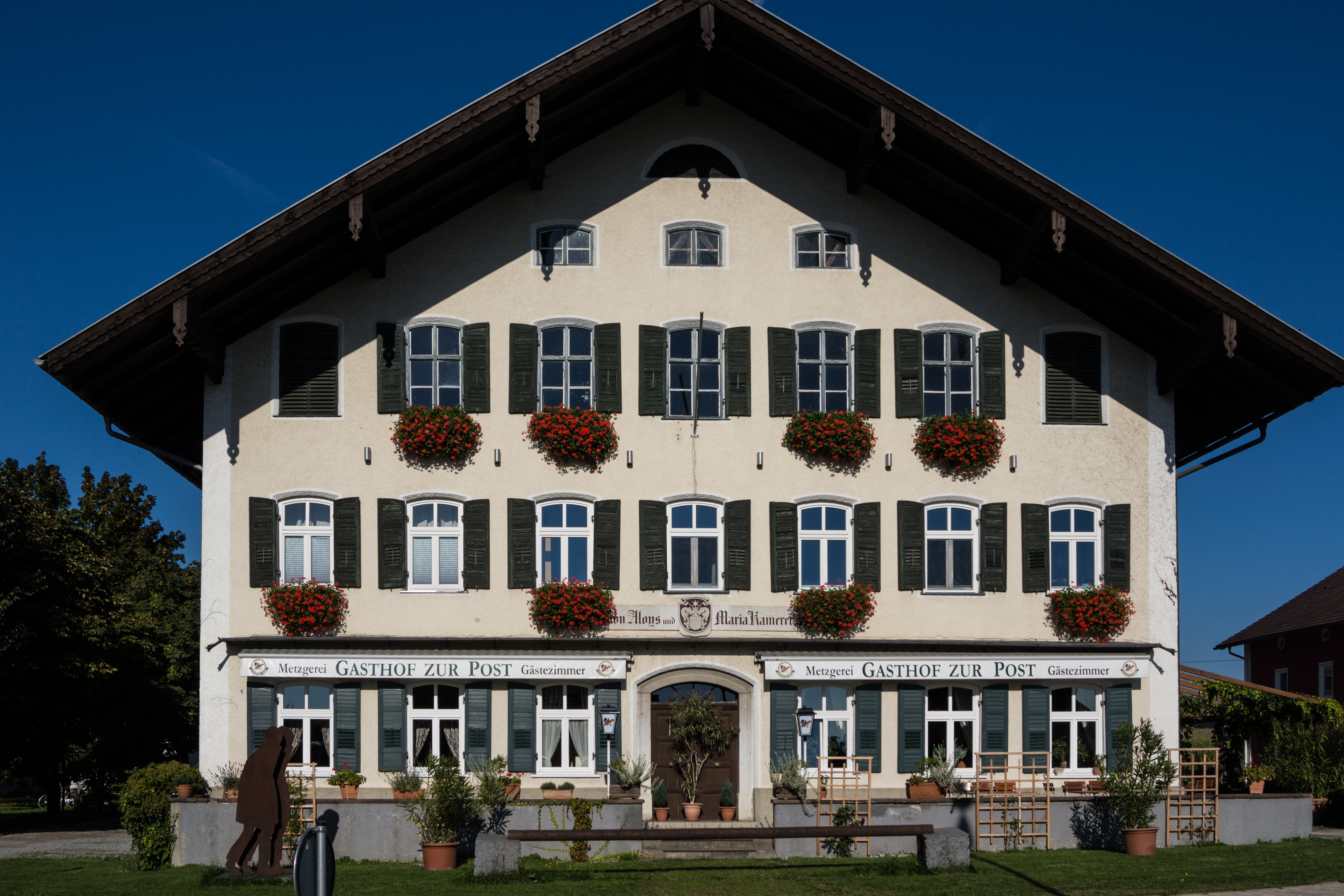 Gasthof in Form eines Einfirsthofes, zweigeschossiger Flachsatteldachbau mit Kniestock, Segmentbogenfenstern und Rundbogenöffnung, giebelseitig bez. 1843.This is a photograph of an architectural monument.